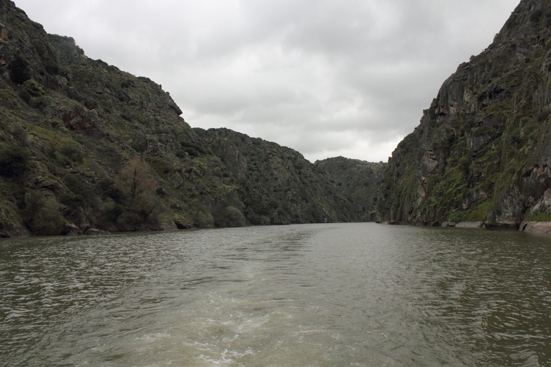 Arribas del Duero en su tramo internacional